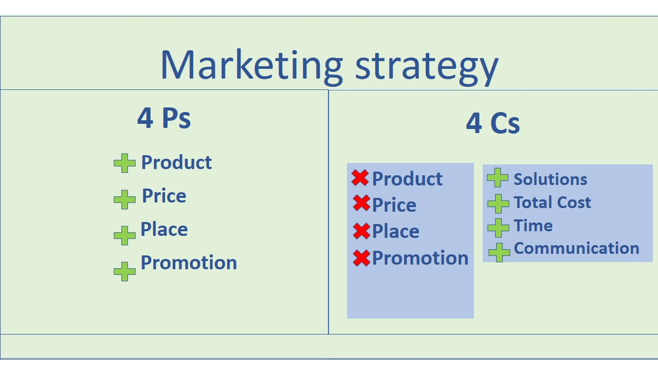 Representation of the differences between 4Ps and 4cS